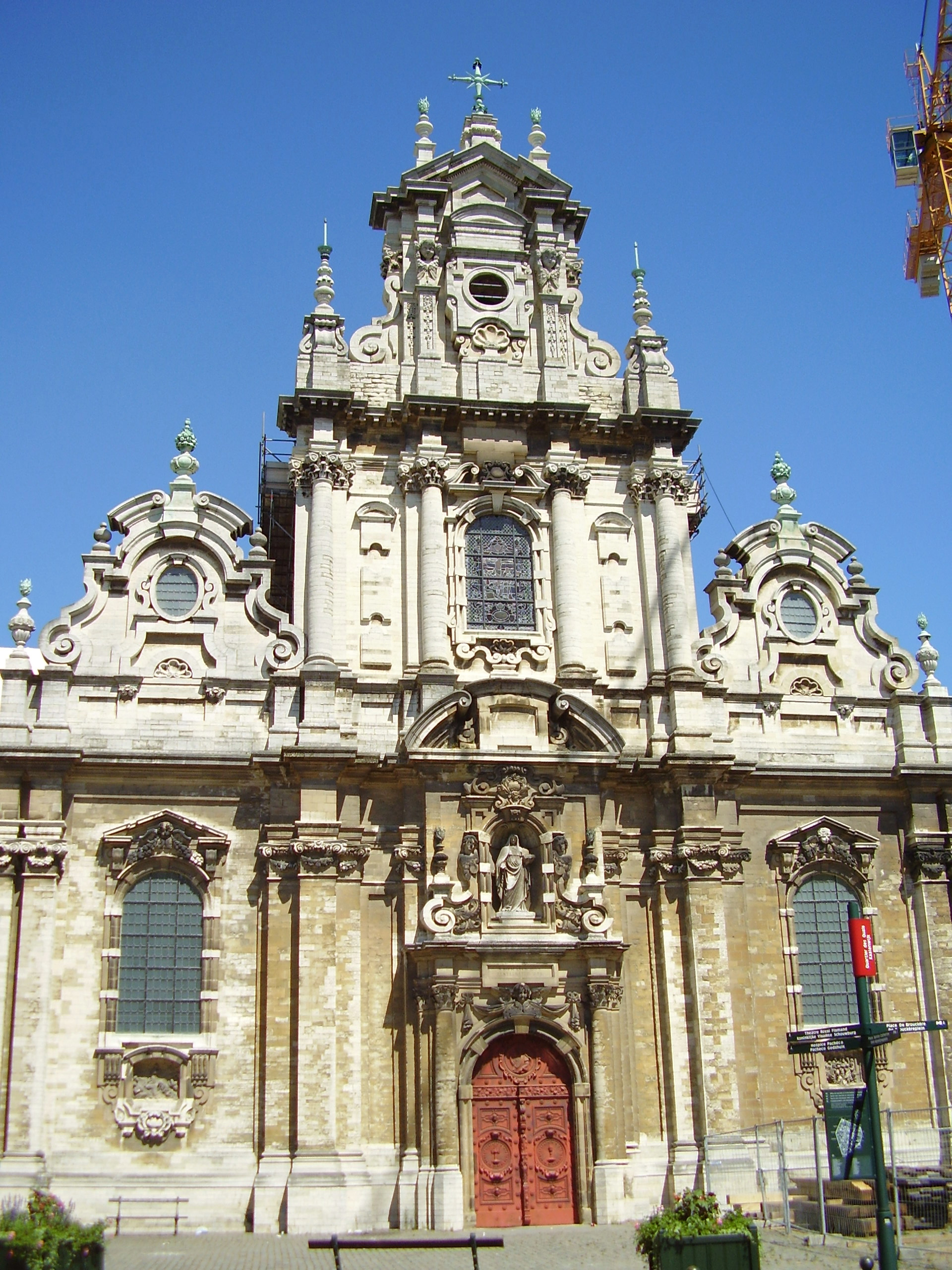 Église Saint Jean-Baptiste du Béguinage(Bruxelles)